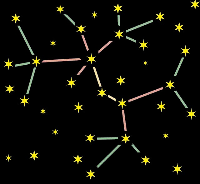 A drawing of the Coral Model of Galactic Colonization theory.